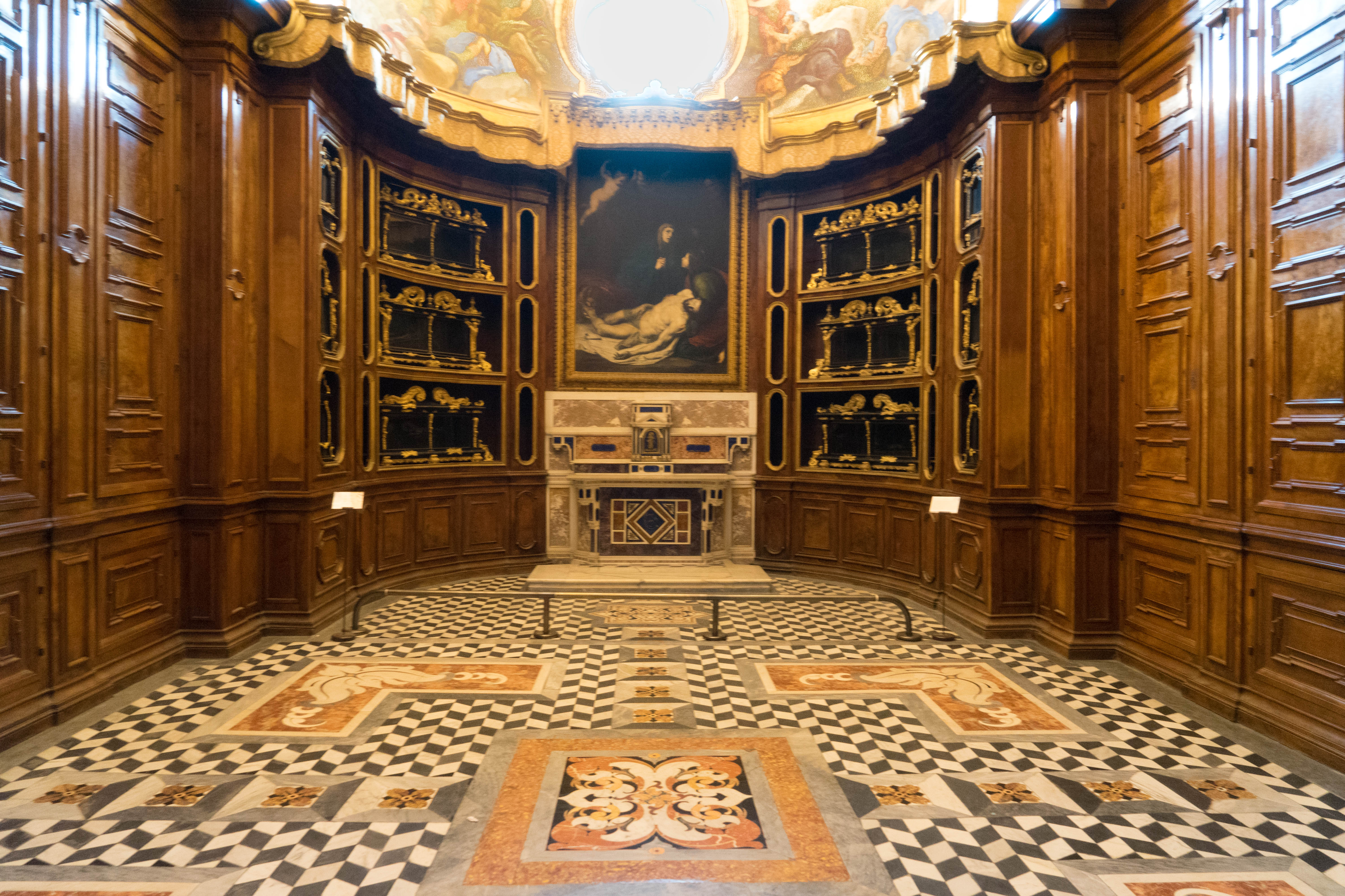 Tesoro Nuovo (Certosa di San Martino)